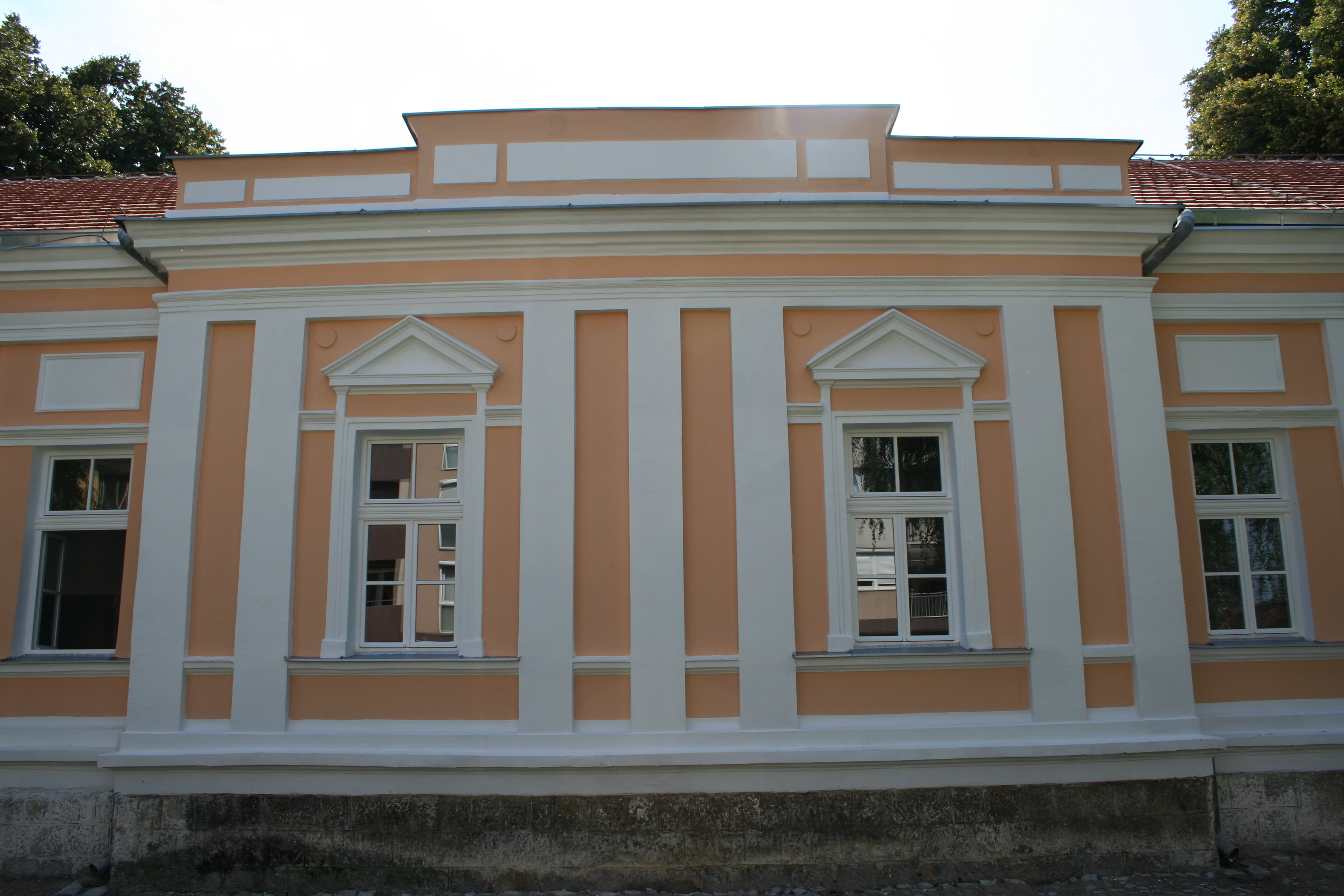 Zgrada Karađorđeva 118-120, Valjevo